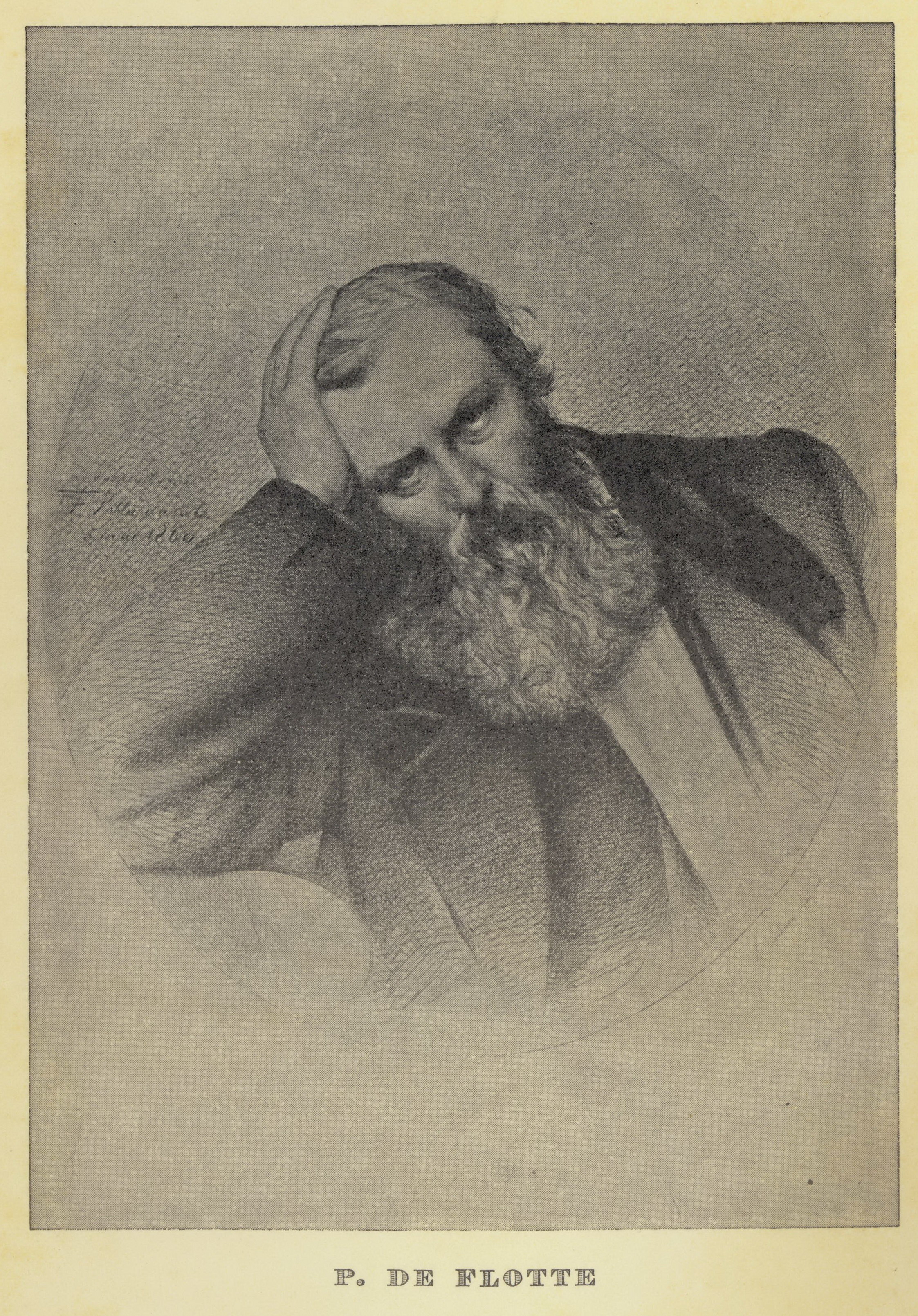 Ritratto di Paolo De Flotte.